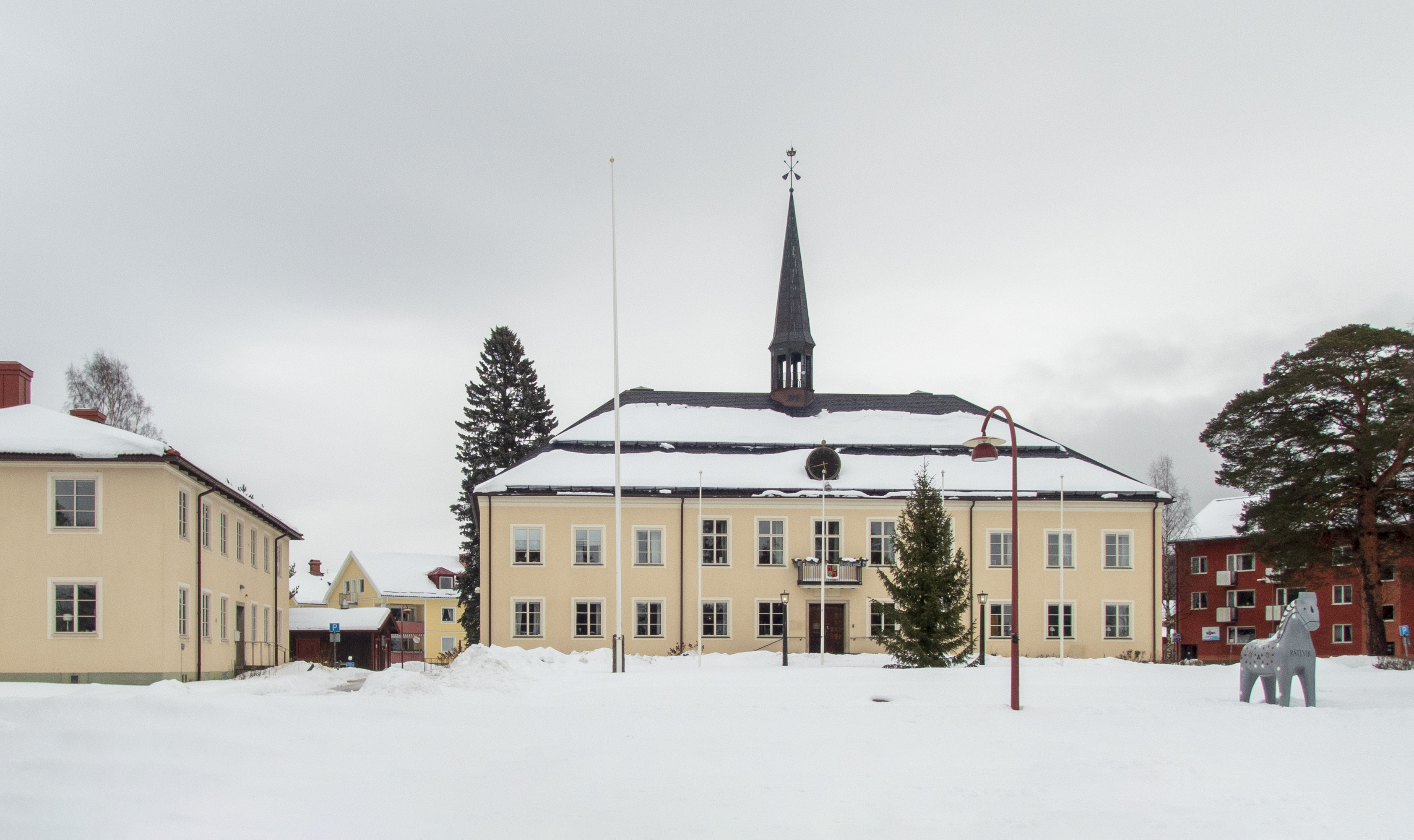 Rättviks kommunhus. Uppfört 1951-1952 som kommun- och tingshus. Byggnaden, som uppfördes för Rättviks tingslag, fungerade som tingshus mellan 1952-1988. Algot Karlsson (Byggherre) Artur von Schmalensee (Arkitekt) Rättviks tingslags tingshusbyggnadsskyldige (Byggherre)